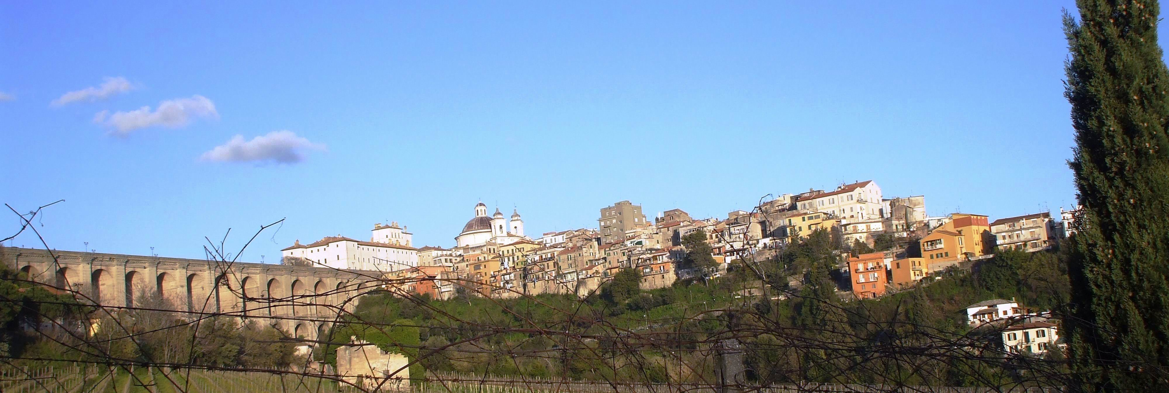 Ariccia panorama